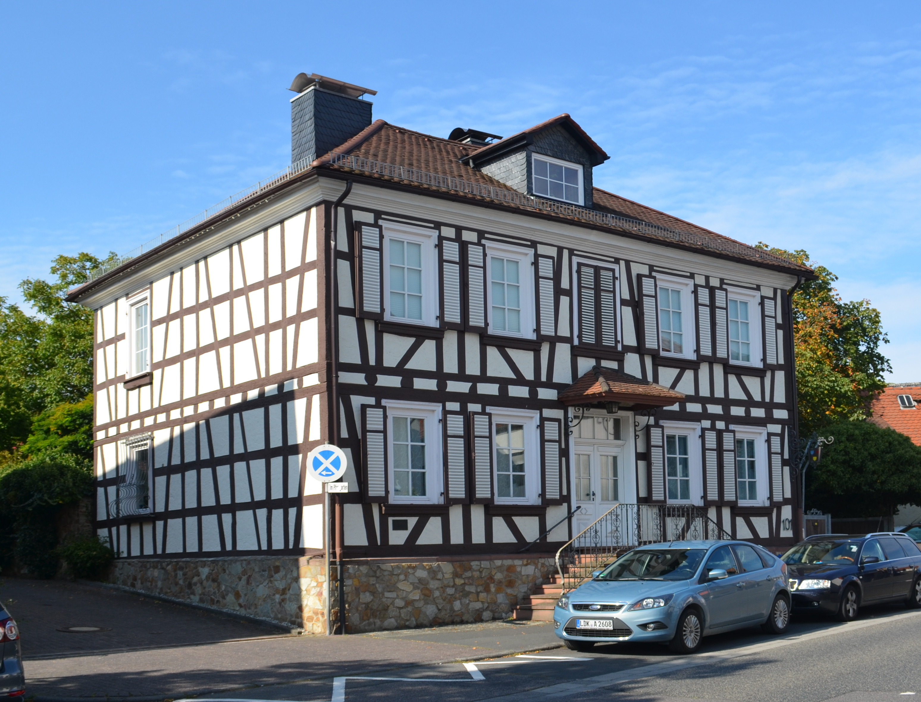 Köppern, Köpperner Straße 101